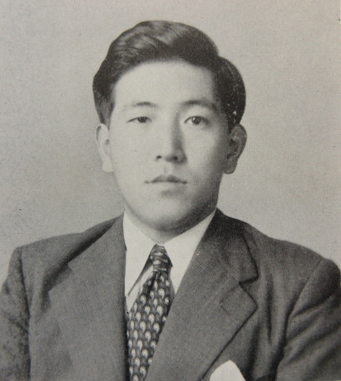 豊田章一郎（1925年2月27日生）